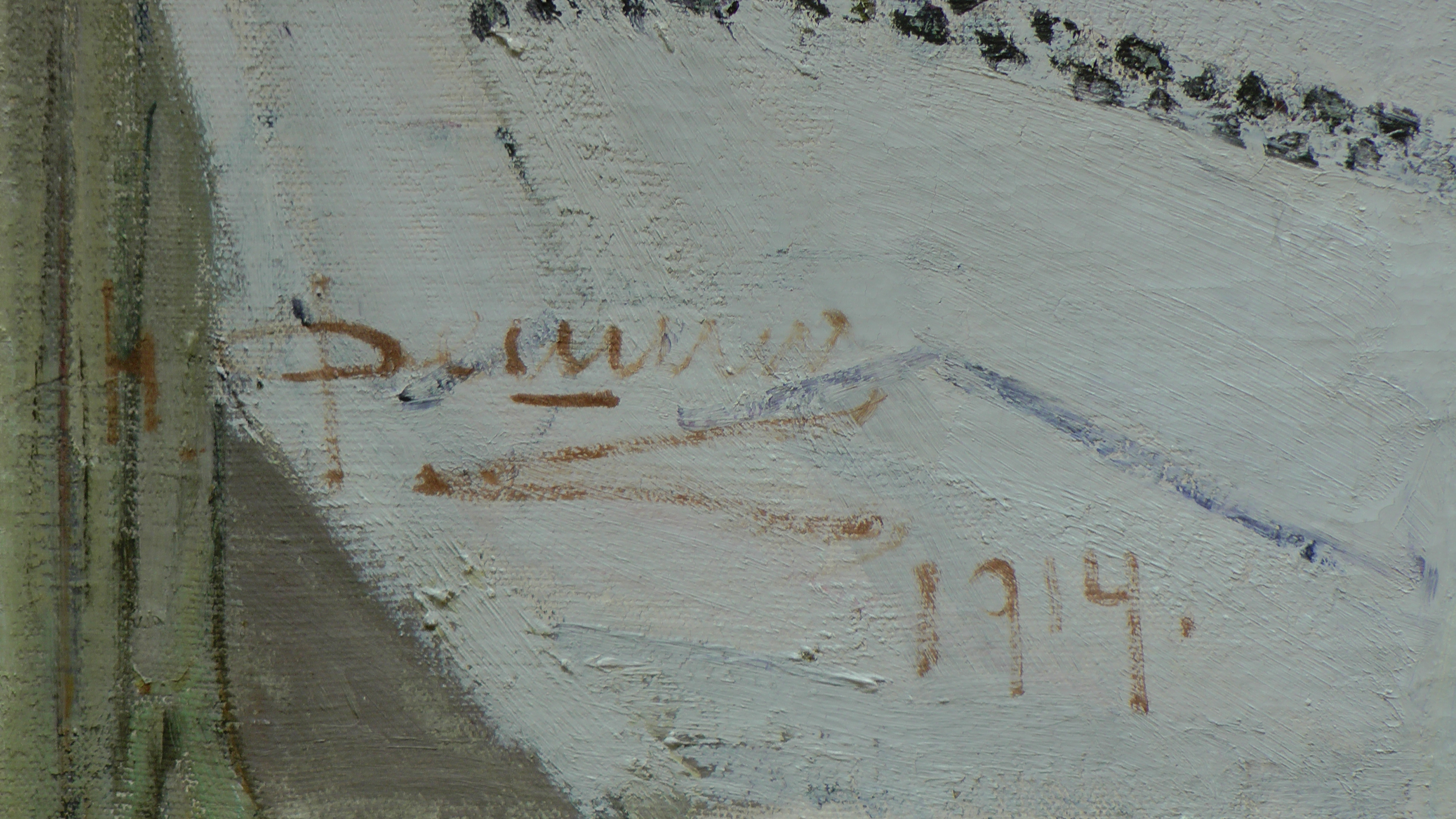 Николай Фешин. Портрет Вари Адоратской. Фрагмент (подпись художника)